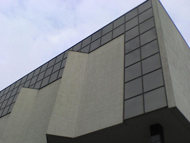 Lublin-filharmonia